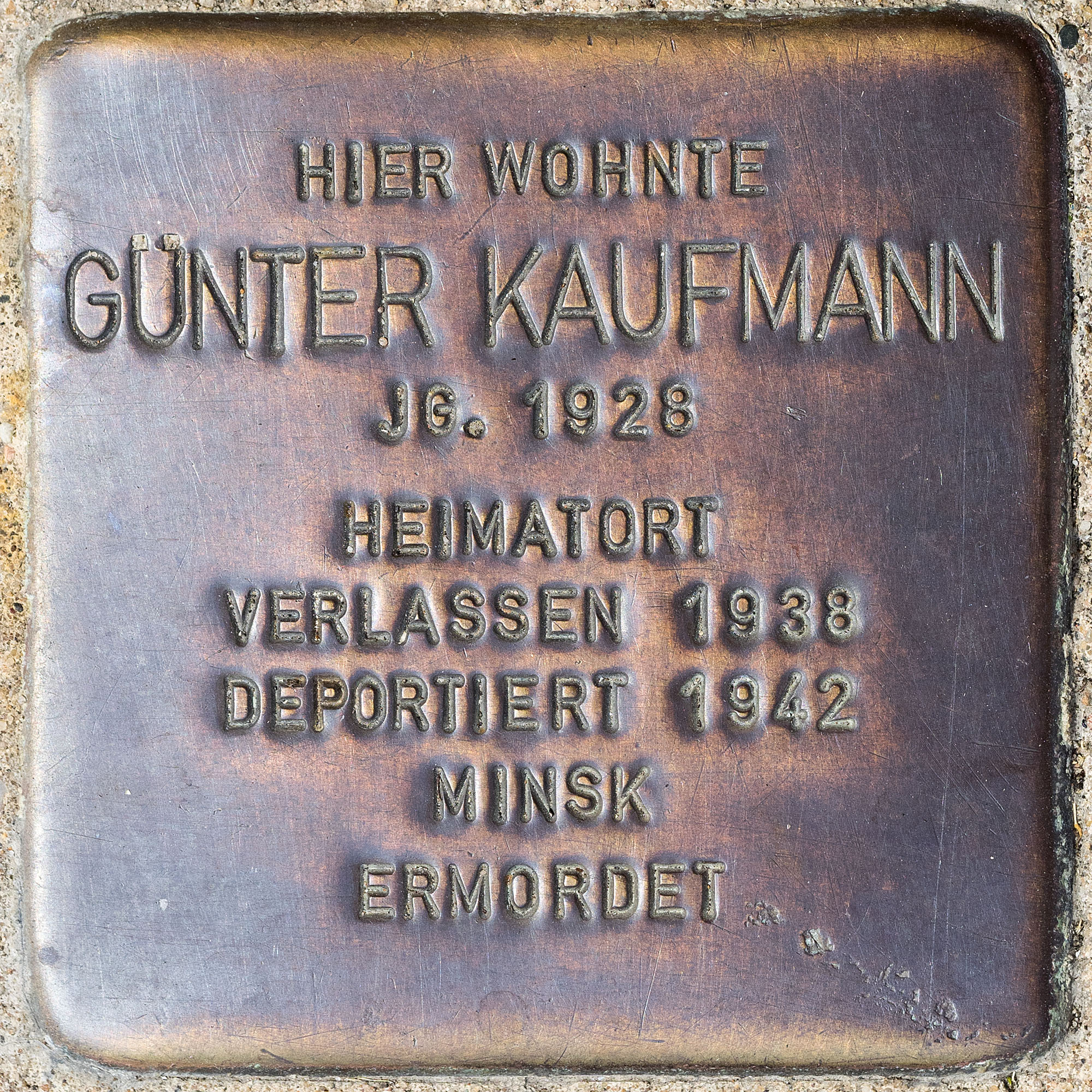 Stolpersteine Roki: Kaufmann, Günter